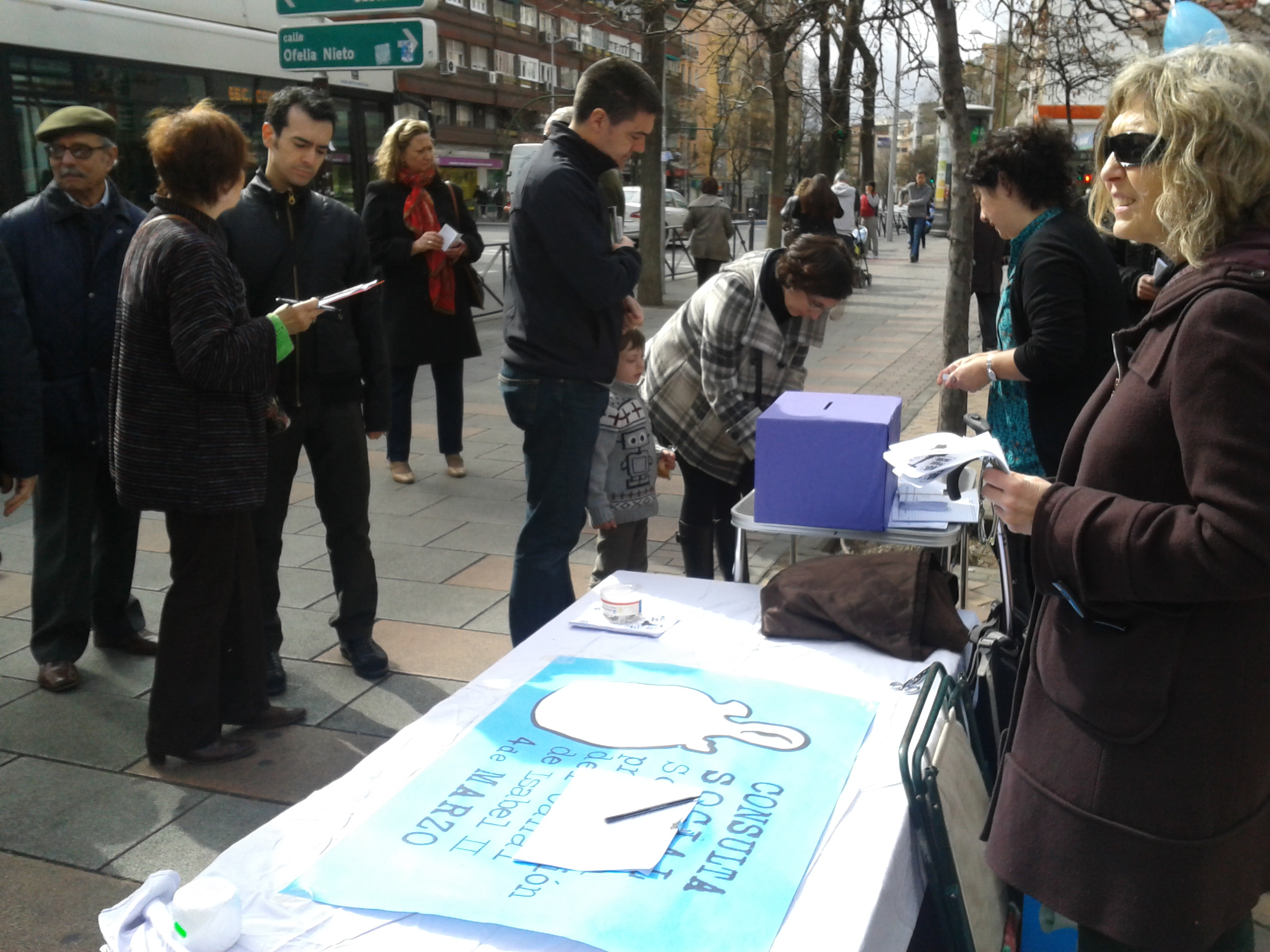 Consulta popular sobre la privatización del Canal de Isabel II